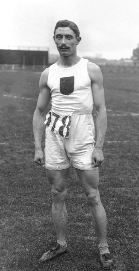 [21-6-14, Colombes, championnats de France amateurs d'athlétisme de l'U.S.F.S.A], Estang, champion de France du saut en longueur sans élan : [photographie de presse] / [Agence Rol]